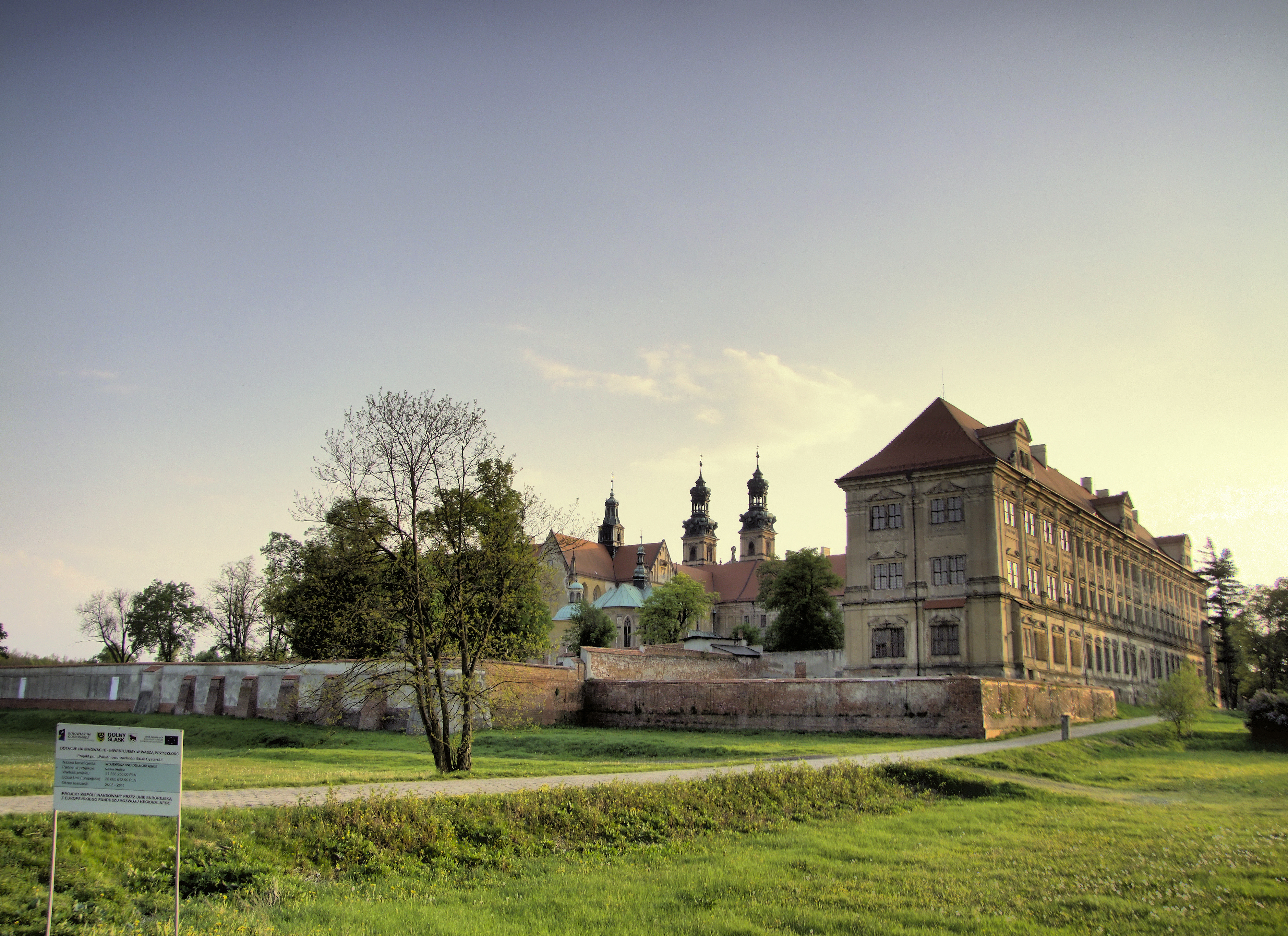 Lubiąż, Pl. Klasztorny - zespół klasztorny cystersów